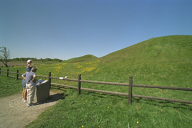 Uppsala högar. Motiv: Gamla Uppsala Nyckelord: Raä-Fastigheter Kategori: Hög Uppsala högar.